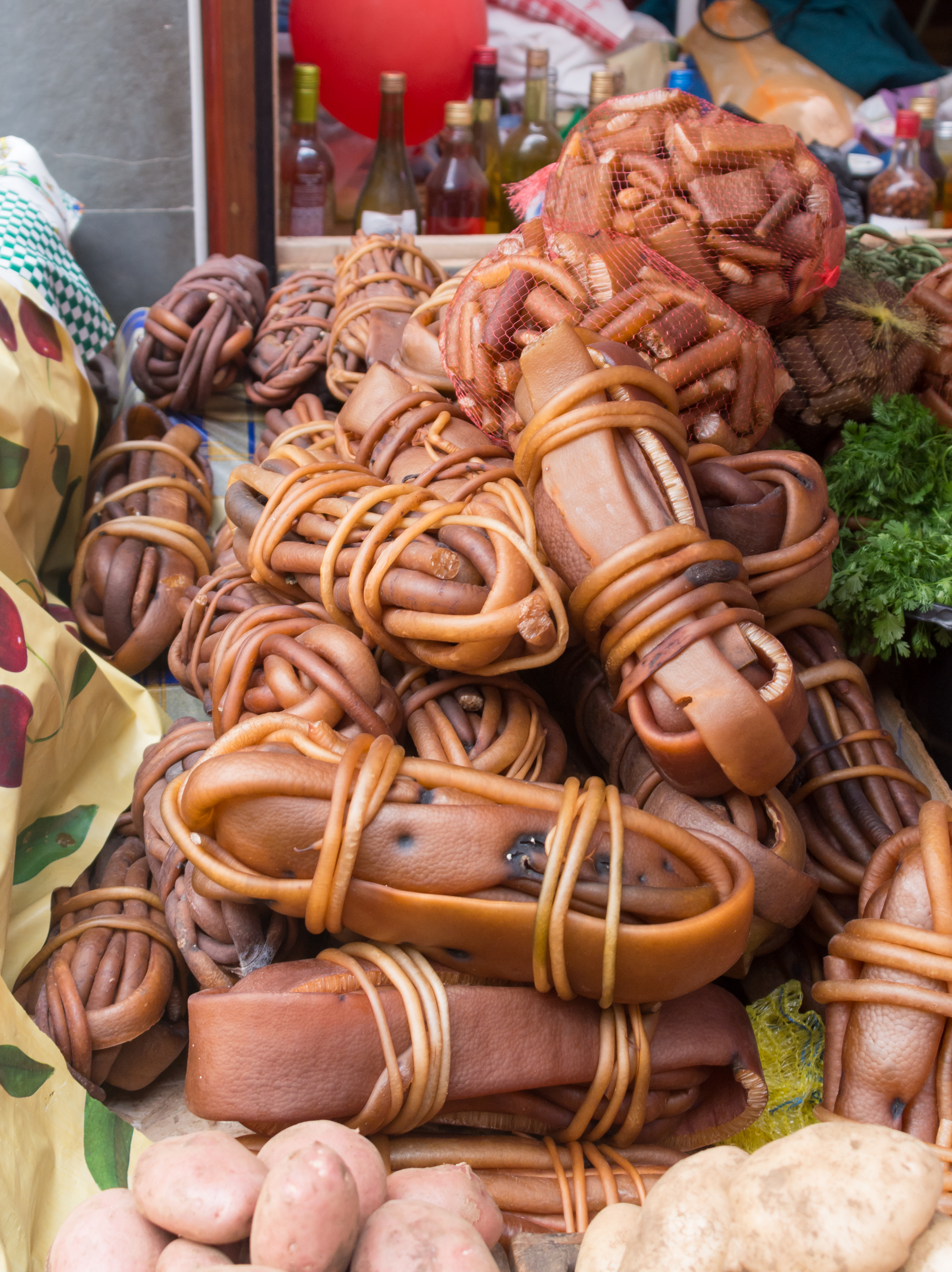 Cochayuyos (Durvillaea antarctica) en Feria Municipal, Ancud, Región de Los Lagos, Chile.